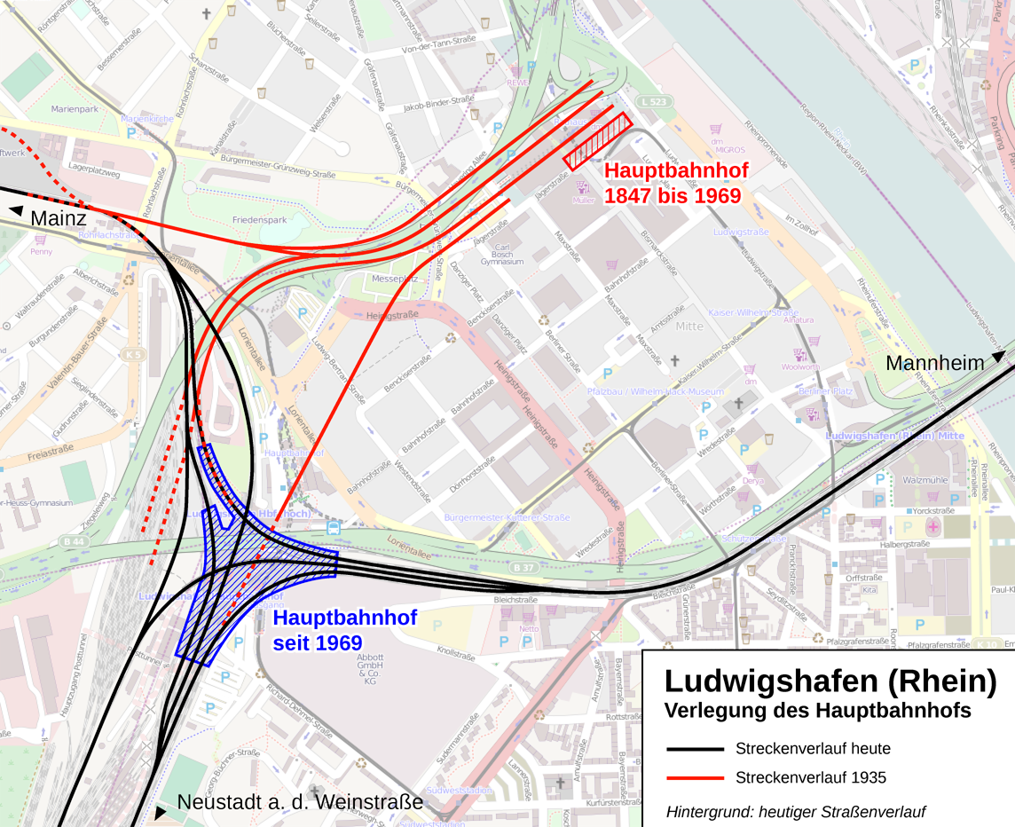 Karte zur Verlegung des Hauptbahnhofs von Ludwigshafen 1969